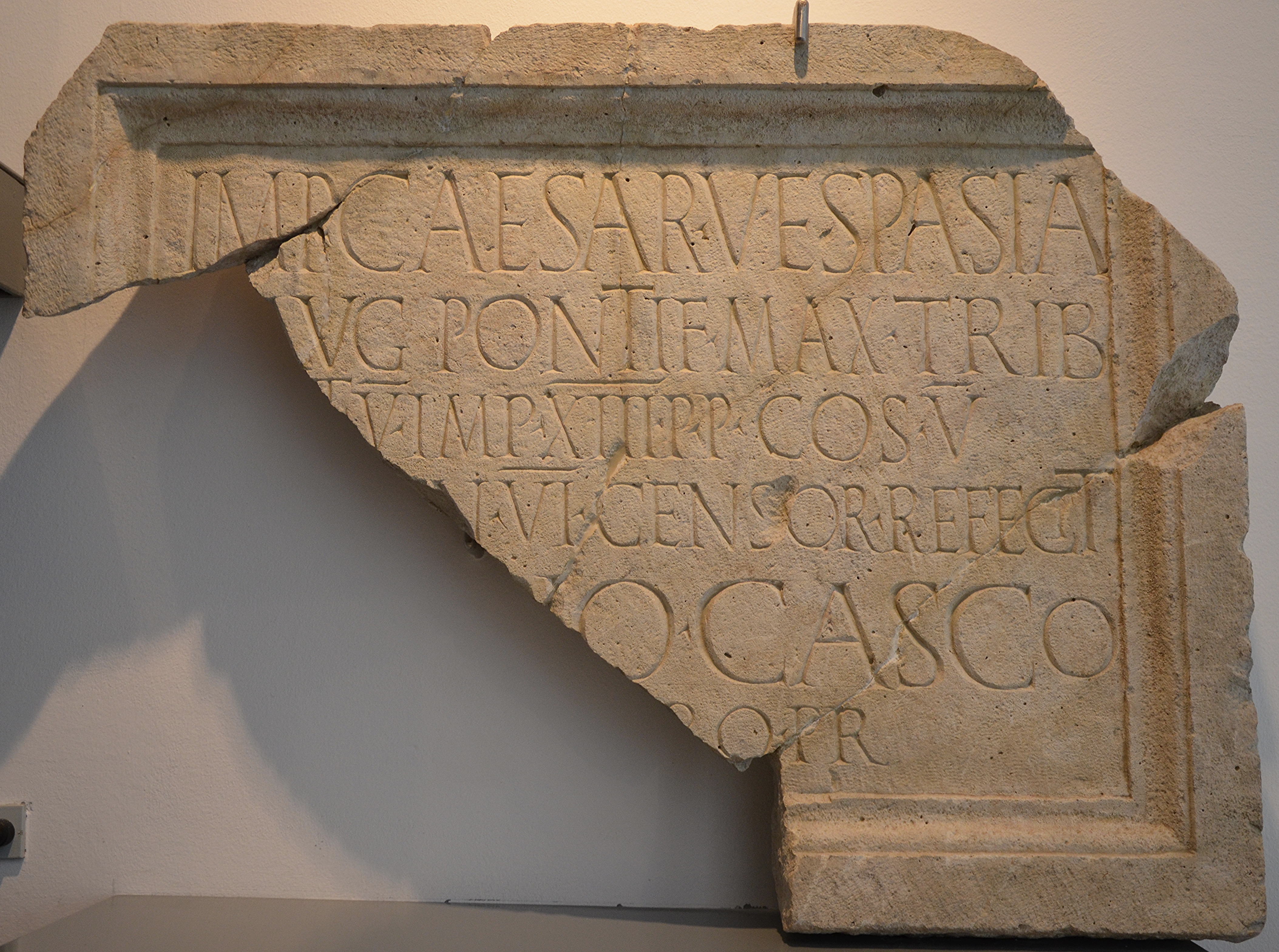 Archaeological museum Narona, Vid, Croatia. Narona-105 = Kurilic 111: Imp(erator) Caesar Vespasia/n(us) Aug(ustus) pontif(ex) max(imus) trib(unicia) / [po]t(estate) V imp(erator) XIII p(ater) p(atriae) co(n)s(ul) V / [desi]gn(atus) VI censor refecit / [Cn(aeo) Ped]io Casco / [leg(ato) Aug(usti) p]ro pr(aetore)